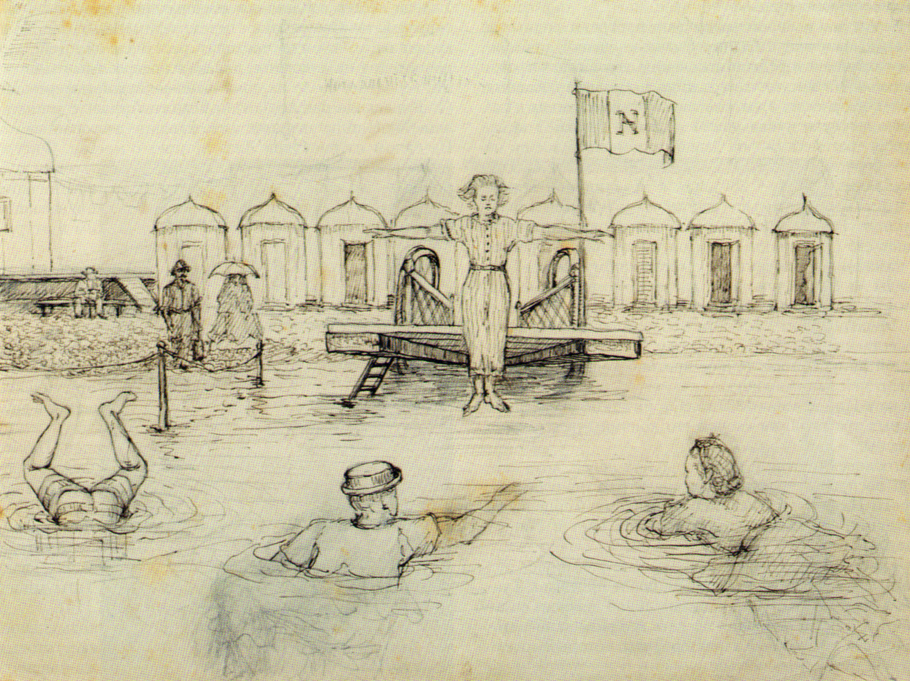 Лиза Герцен на купании в Ницце. Рисунок Н.А.Герцен (1844-1936)